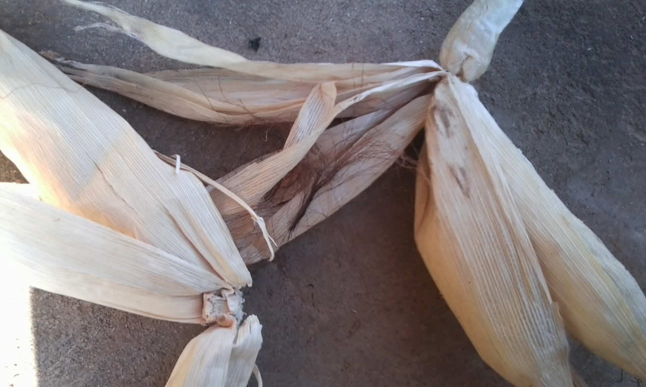 नेपाली: Khosta